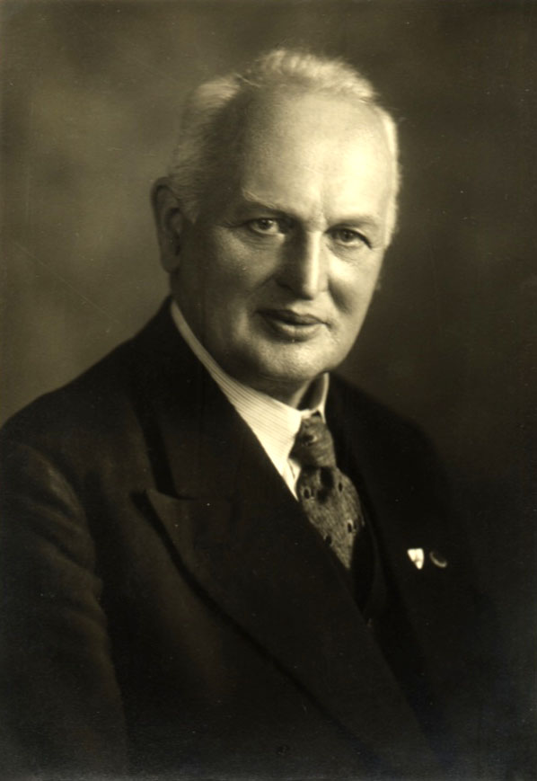 Ottor zur Linde